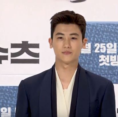 23일 오후 서울 영등포구 타임스퀘어 아모리스홀에서 열린 KBS 2TV 새 수목드라마 '슈츠(Suits)' 제작발표회가 열렸다.